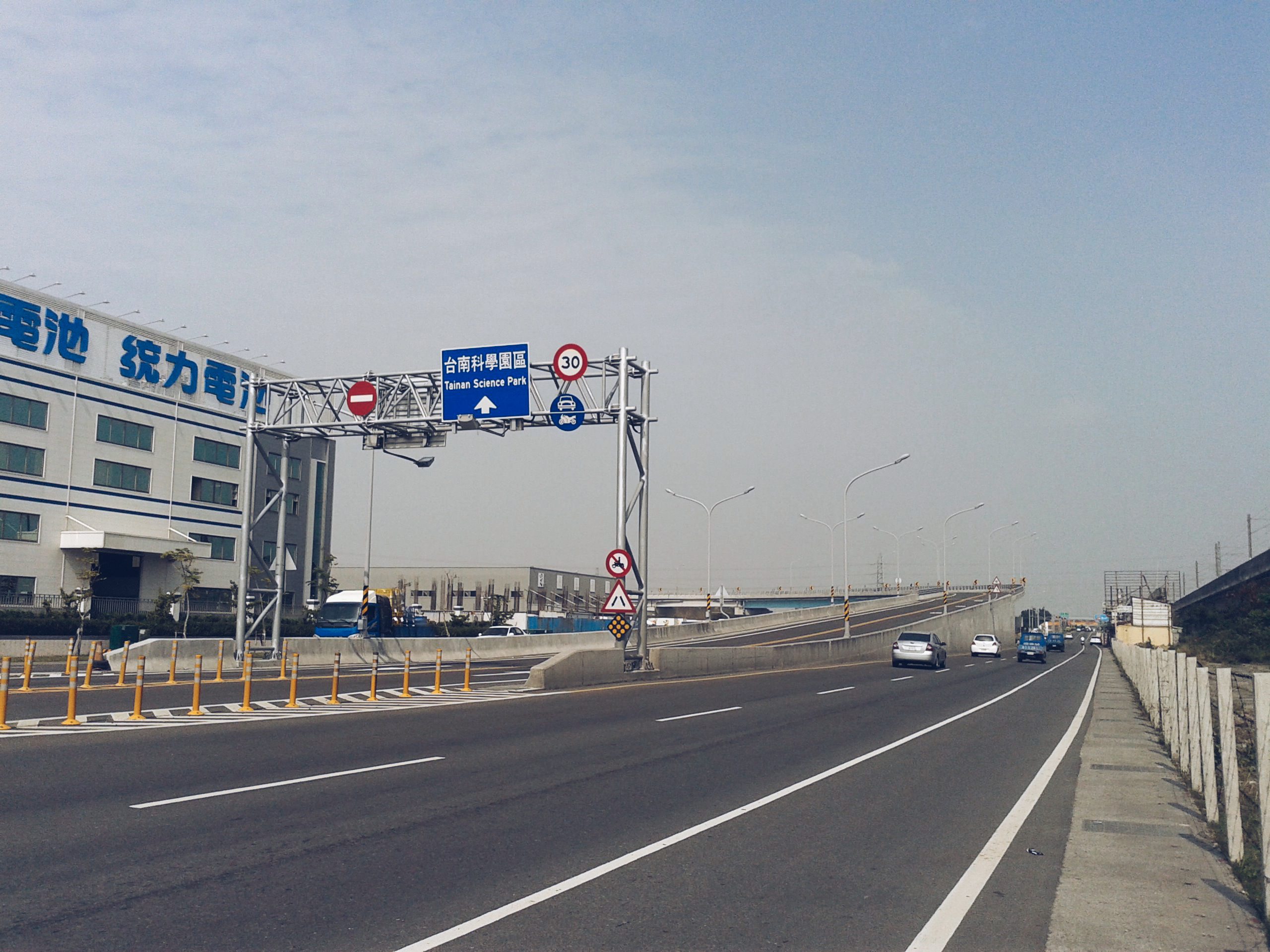 台1線永康區中正北路沿線是典型工業聚落。圖為線上設有的南科聯絡道。